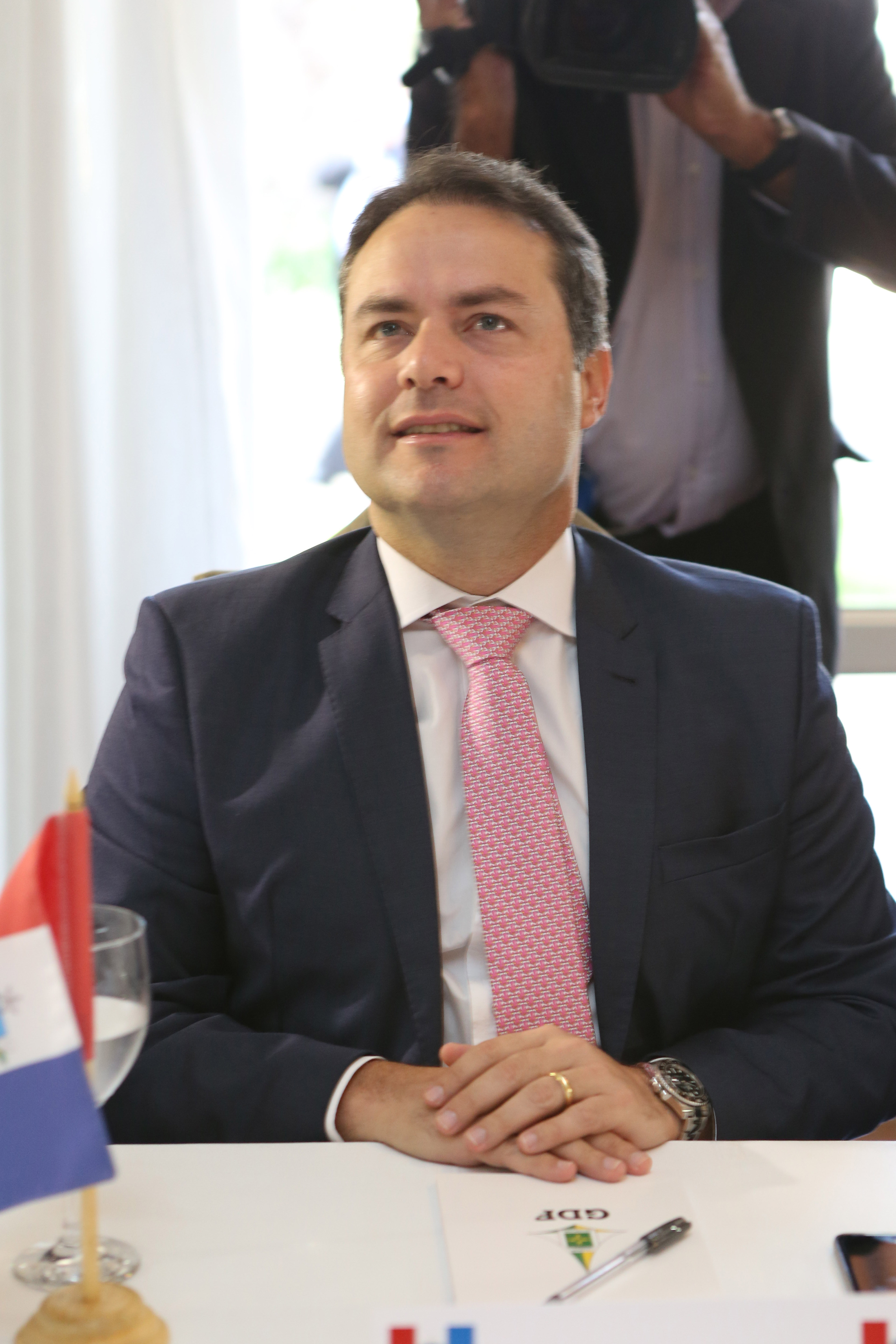 Governador de Alagoas, Renan Filho.